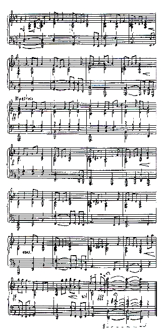 Gagauz: Gagauziya Milli Marşı